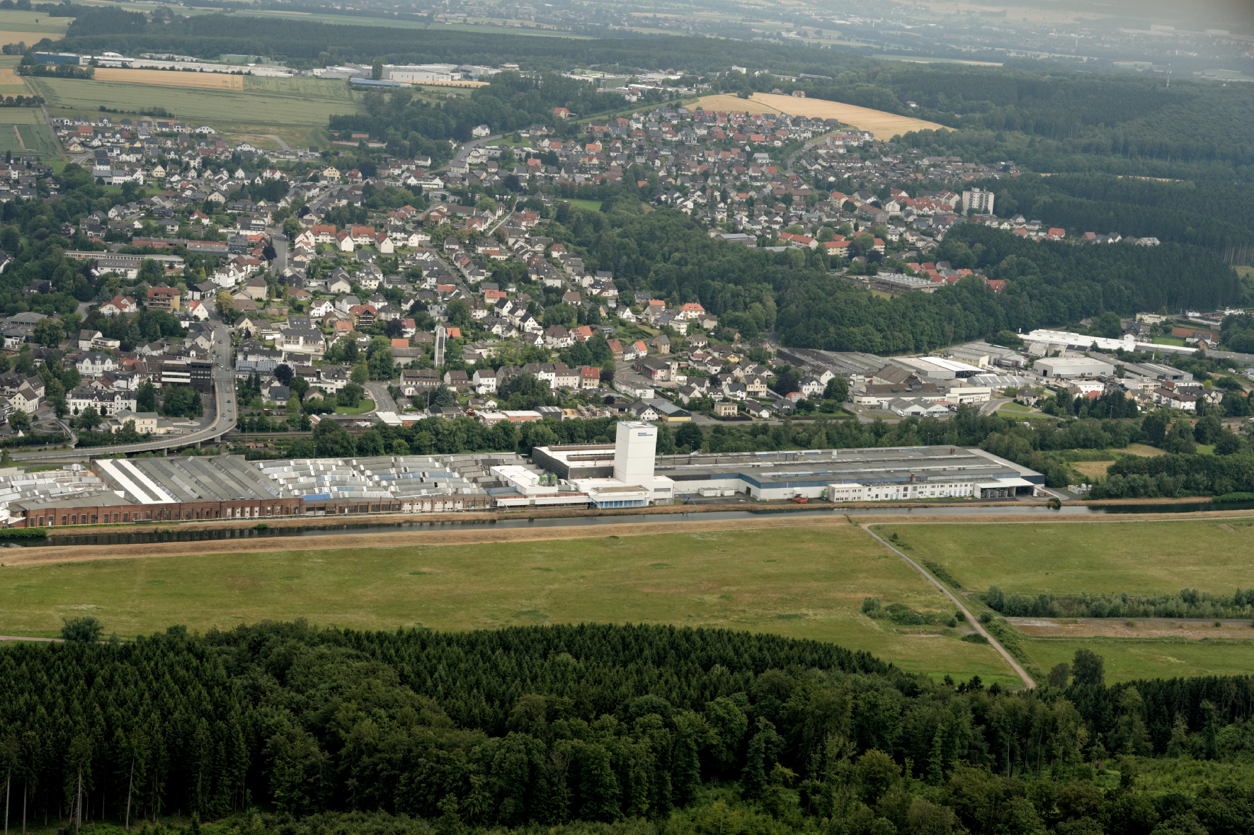 Blick auf Ort Wickede (Ruhr), Werksanlagen von Wickeder Westfalenstahl, davor der Obergraben (Abzweig von der Ruhr), Blickrichtung Nord. The making of this document was supported by the Community-Budget of Wikimedia Germany.